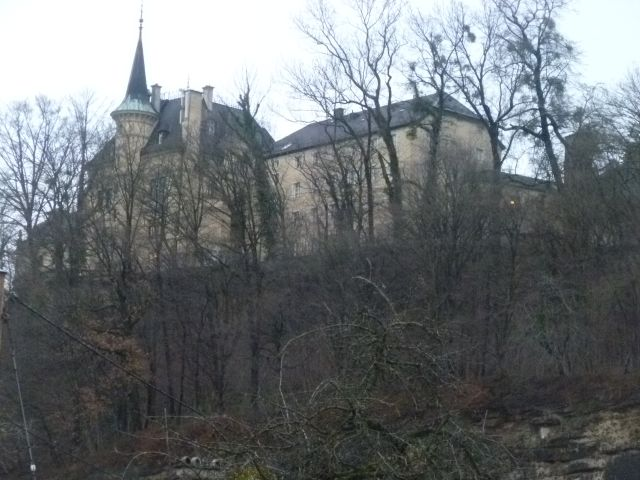 Pallottinerschlössl_von_der_Augustinergasse_aus